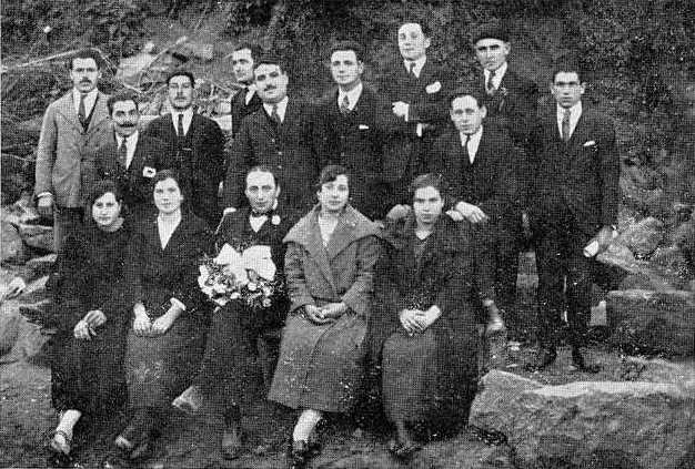 Xavier Soto homenaxeado polo cadro de declamación Aurora de Sárdoma con motivo da estrea da obra Terra ceibe, fotografía en Vida Gallega 1924